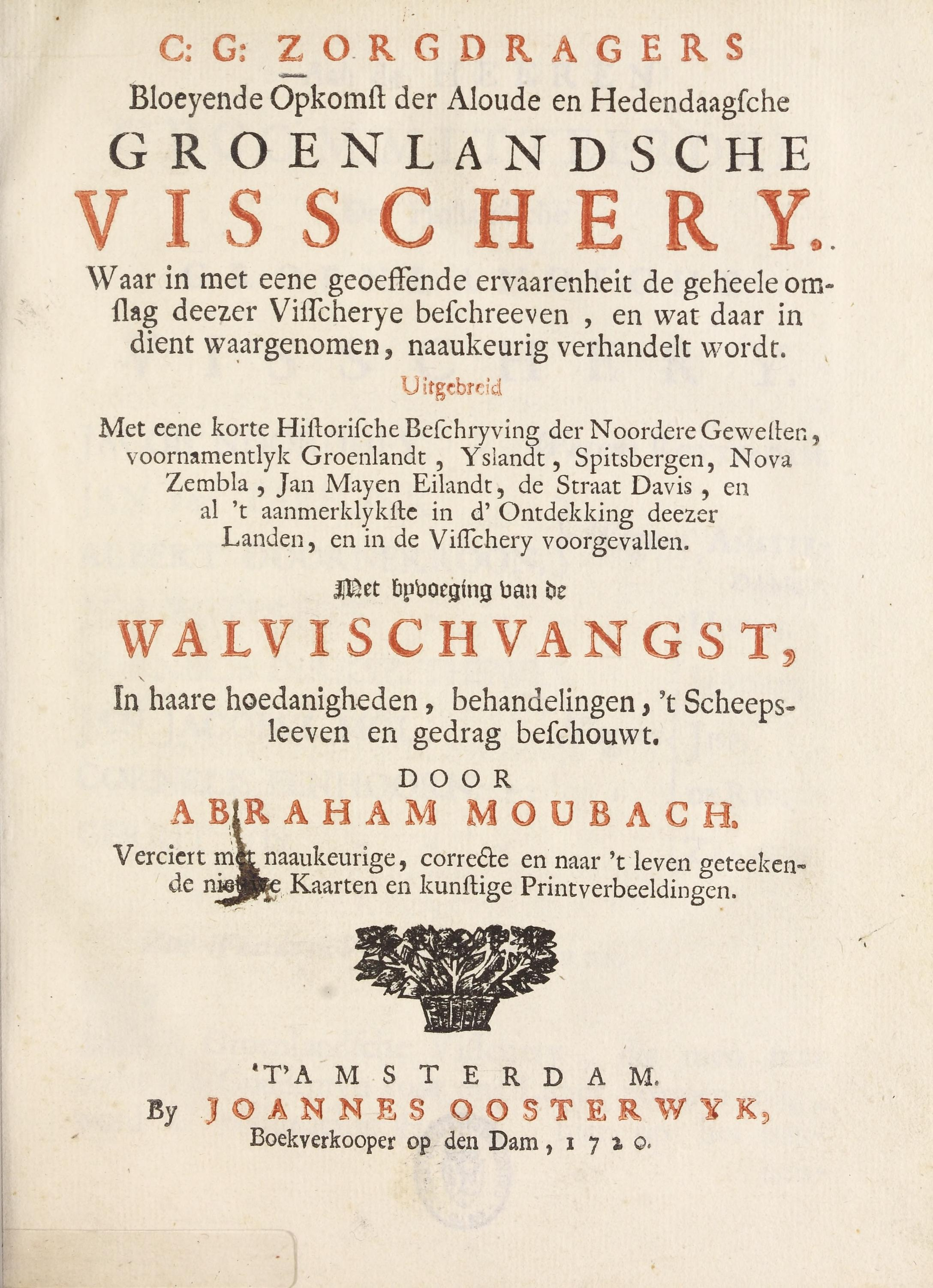 Illustrasjon hentet fra boken "C.G. Zorgdragers Bloeyende opkomst der aloude en hedendaagsche Groenlandsche visschery" av Zorgdrager, Cornelis Gijsbertsz og utgitt av By Joannes Oosterwyk (nl, 1720)